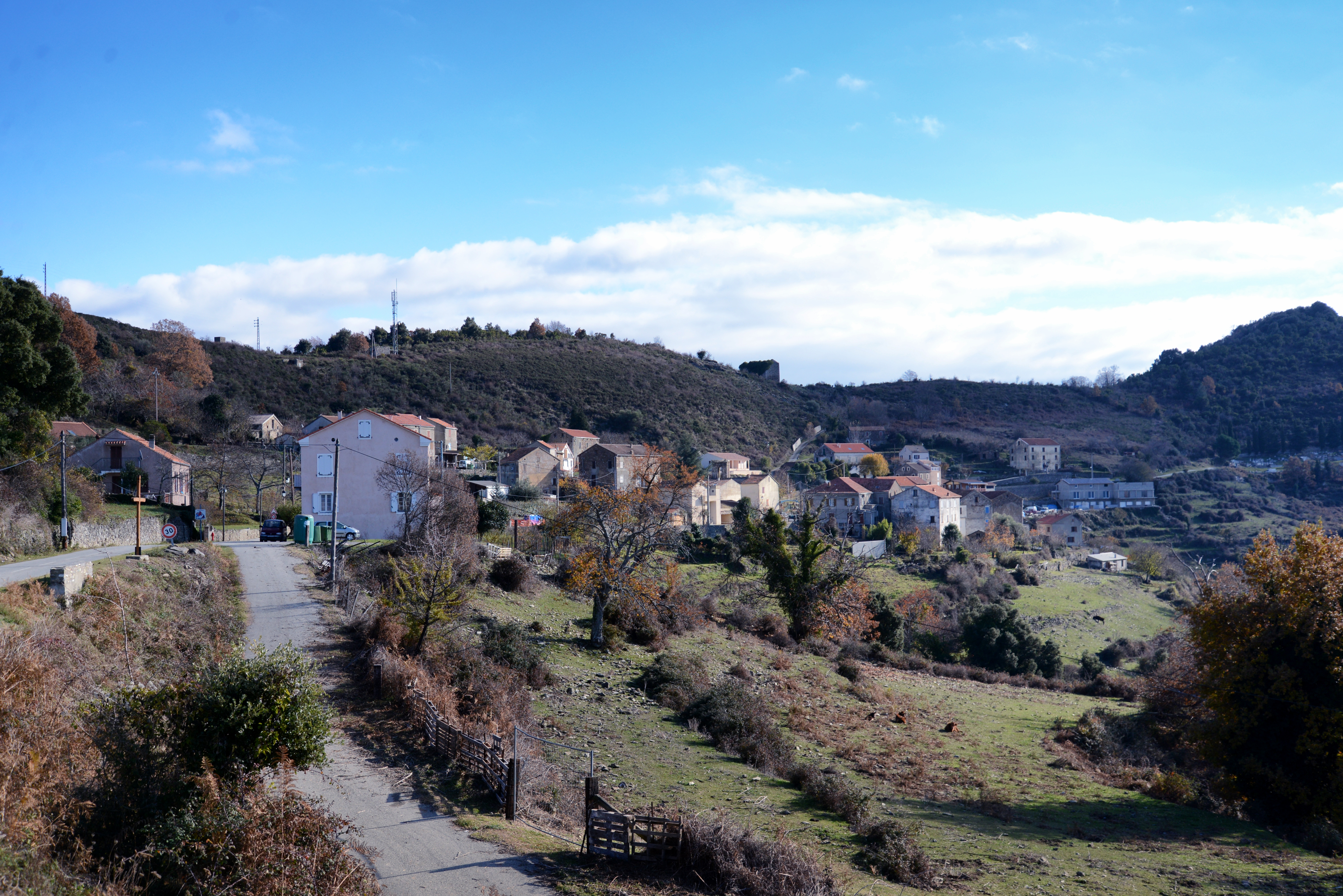 Giuncaggio, Rogna (Corse) - Petit « village en balcon » sur la vallée du Tavignanu, à l'extrême sud de la Castagniccia.